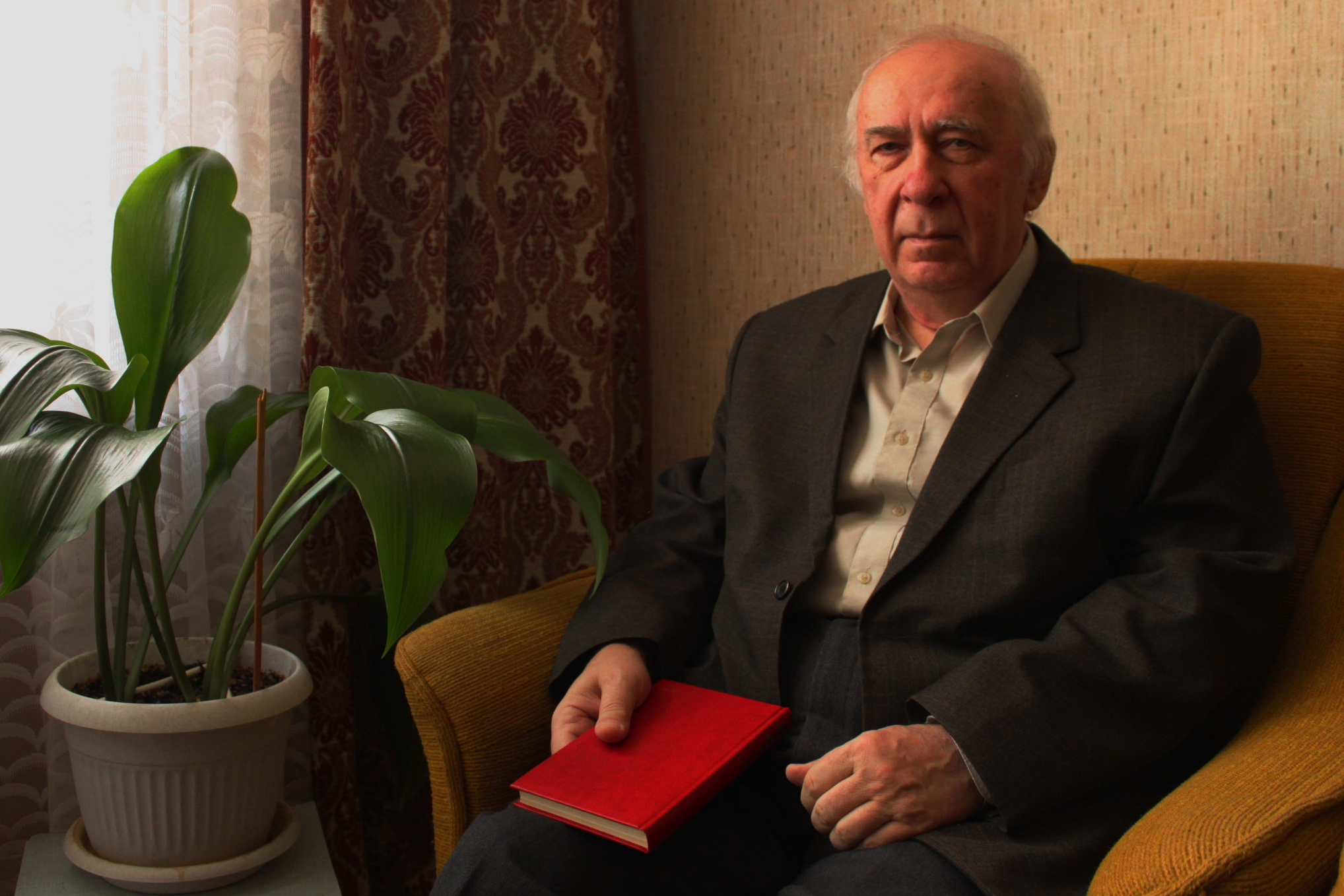 Профессор Кузнецов В. В. дома после работы.